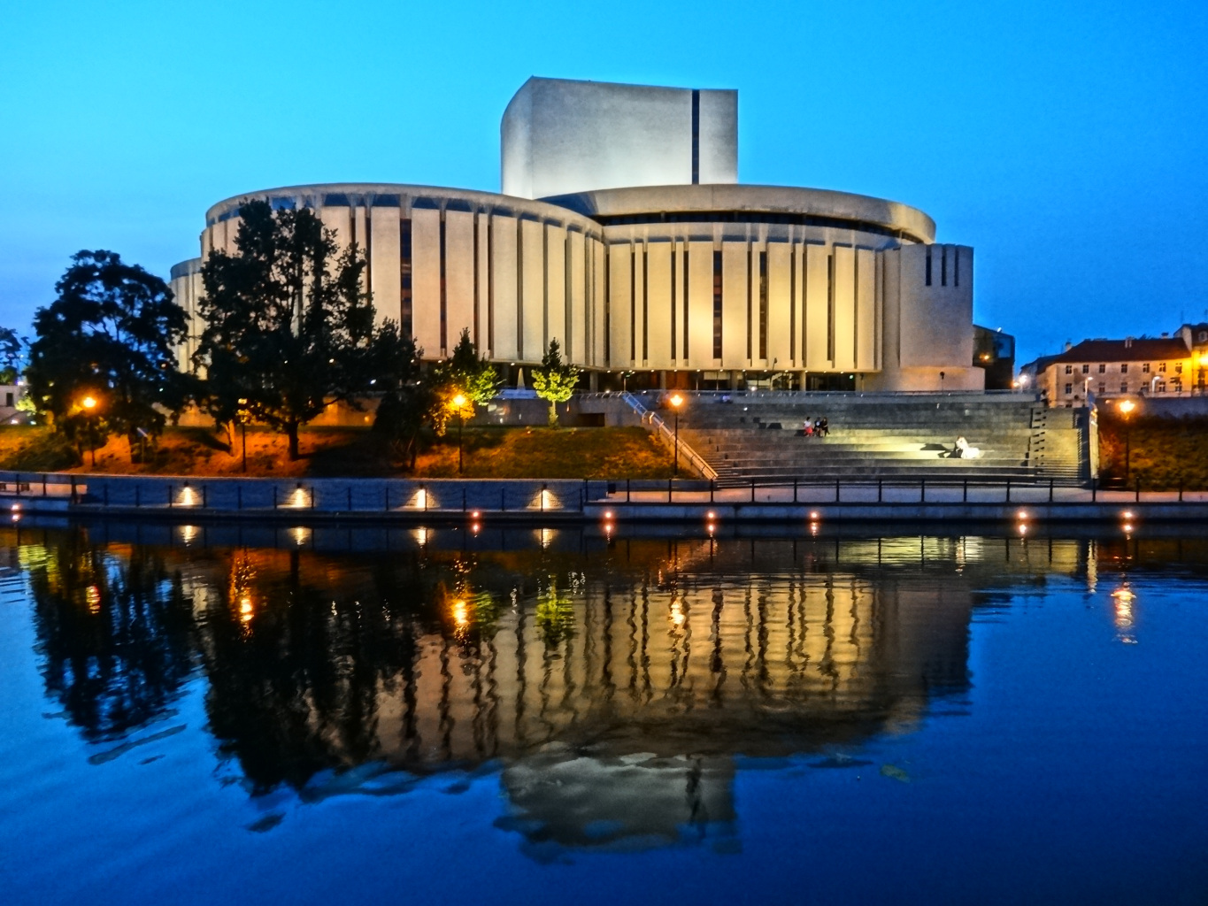 Budynek Opery Nova zbud. w latach 1973-2006, Bydgoszcz ul Ferdynanda Focha 5